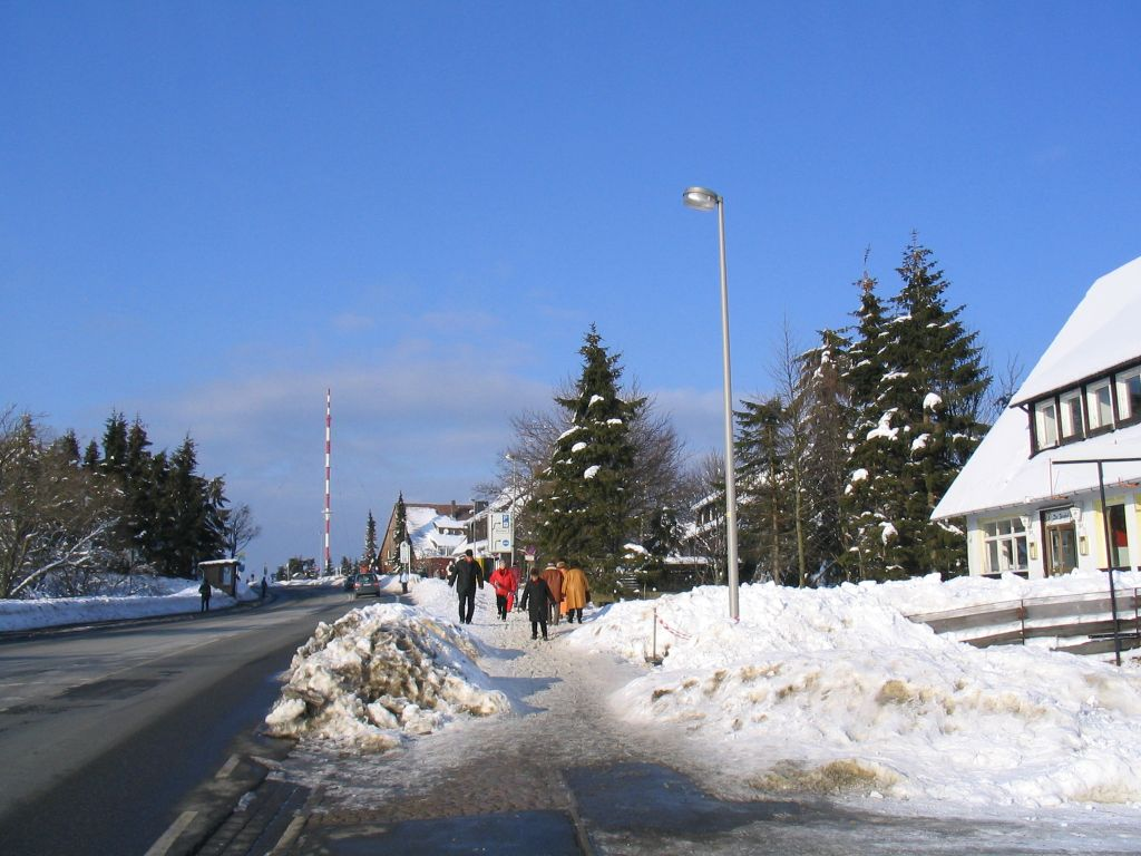 Torfhaus im Winter